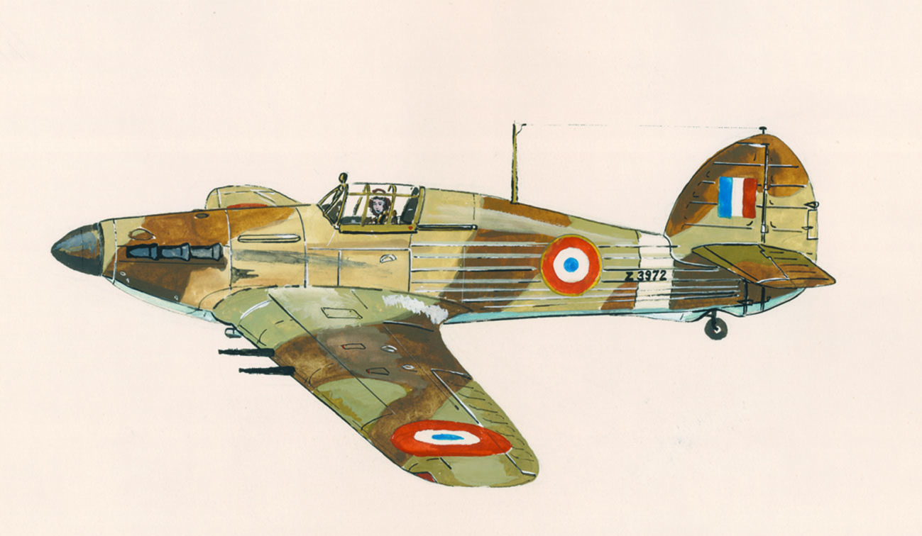 Hurricane